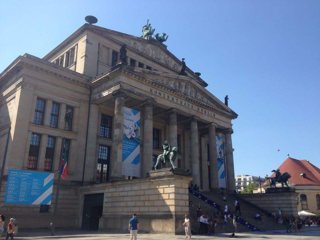 Das Bild zeigt das Konzerthaus am gendarmenmarkt in Berlin im Sommer 2018, während der 19. Saison von Young Euro Classic. Zwischen den Säulen vor dem Konzerthaus und über der Freitreppe sind die Banner von Young Euro Classic aufgespannt.